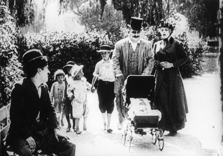 Escena de la película The Face on the Bar Room Floor de Charlie Chaplin